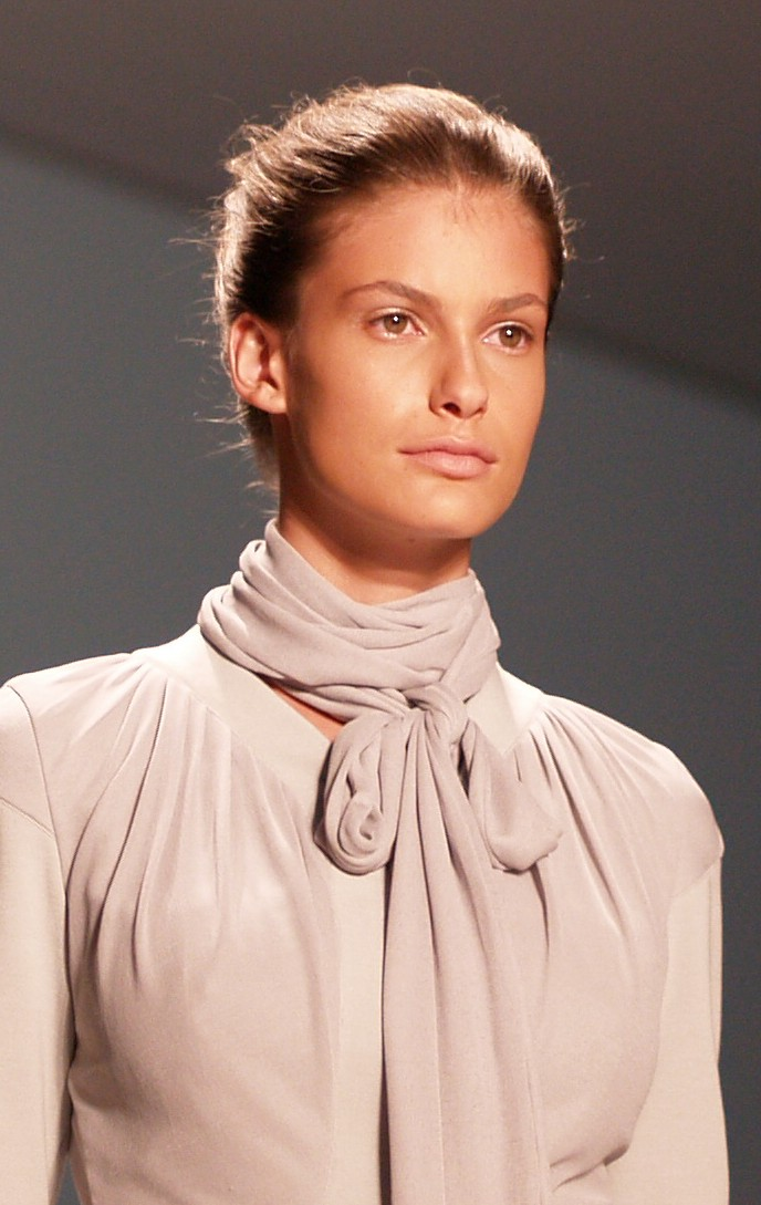 Model Caroline Francischini